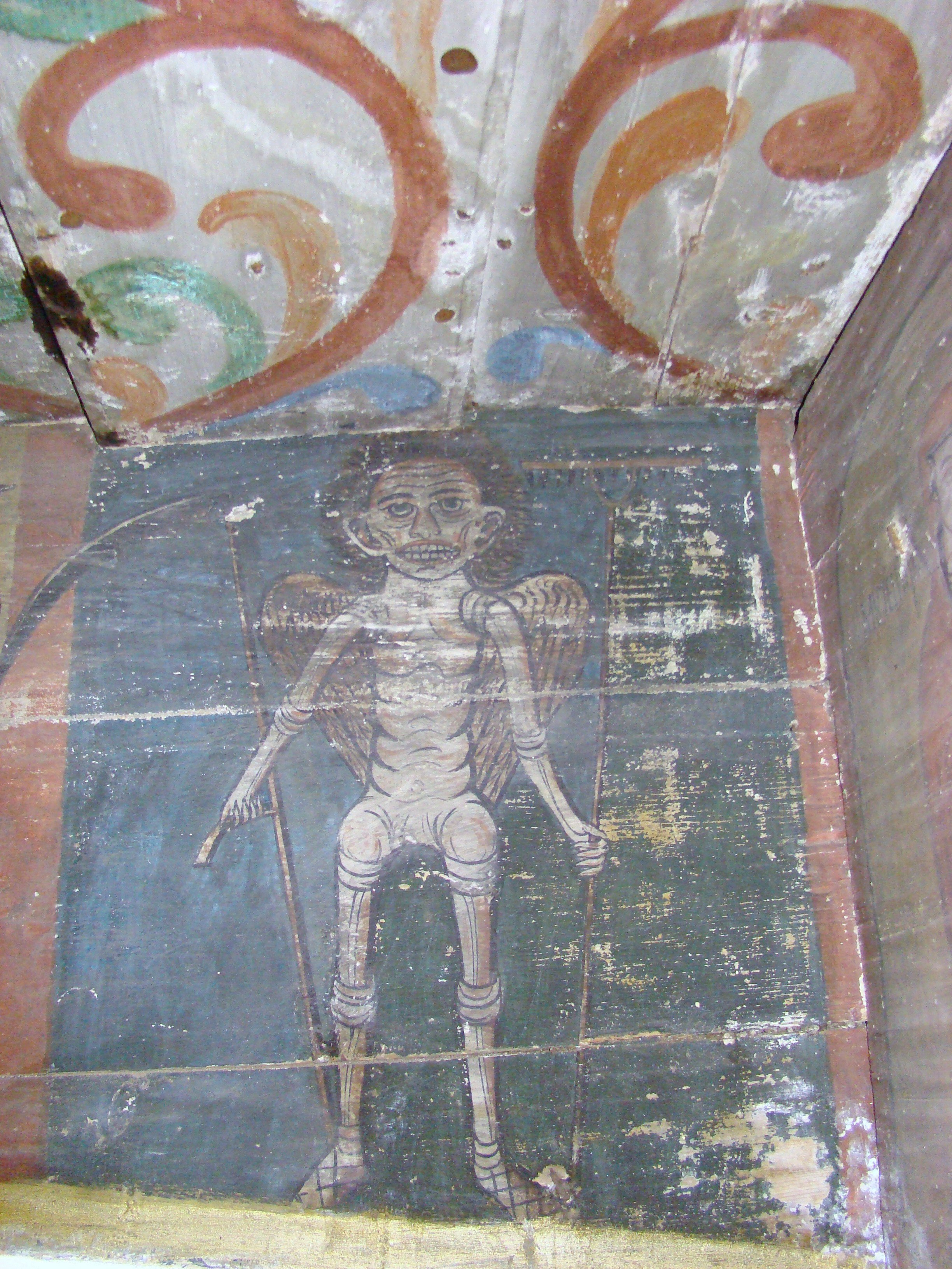 Biserica „Sfinții Arhangheli Mihail și Gavril” din Botean, județul Bihor